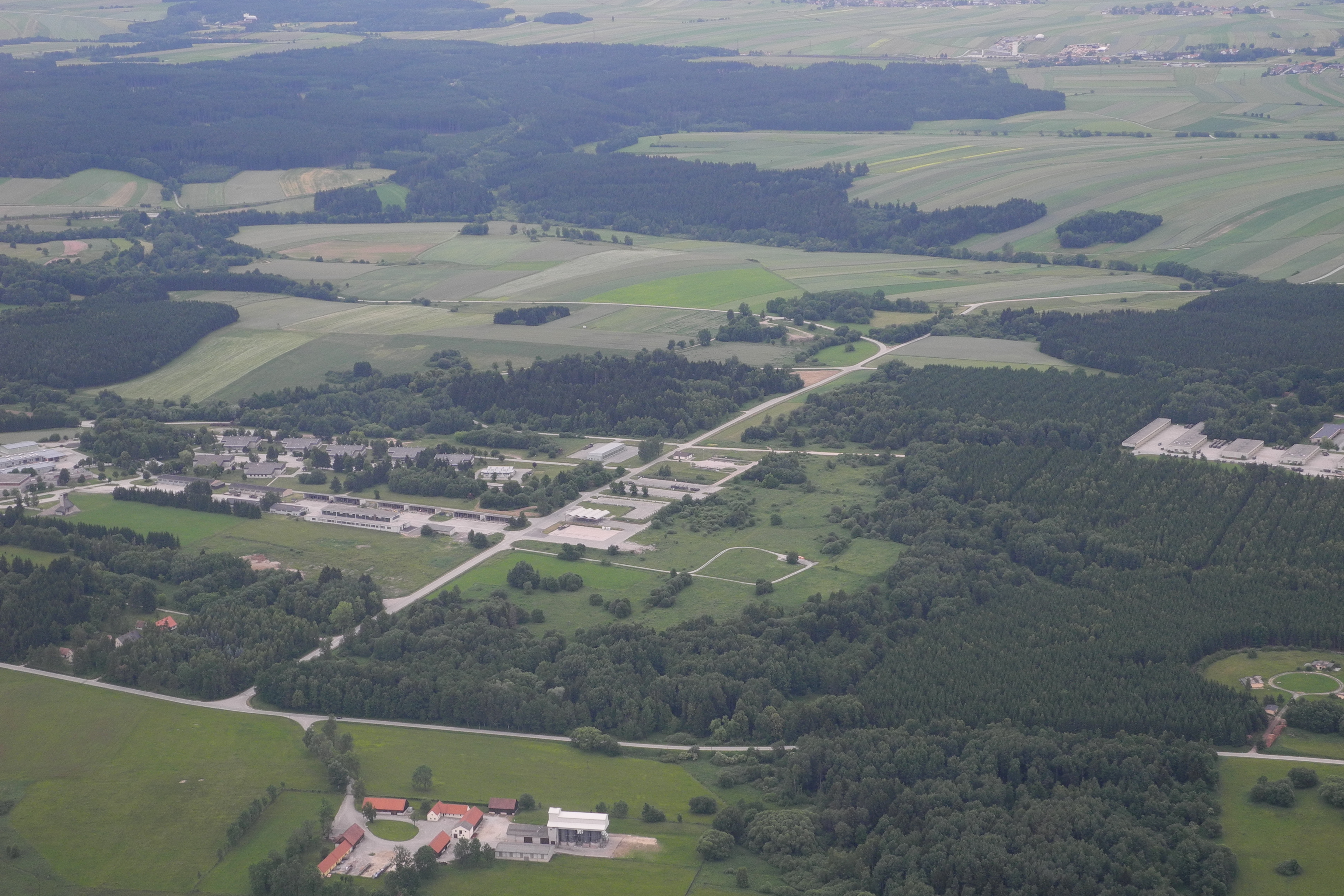 Truppenübungsplatz Allentsteig VFR Ostösterreich